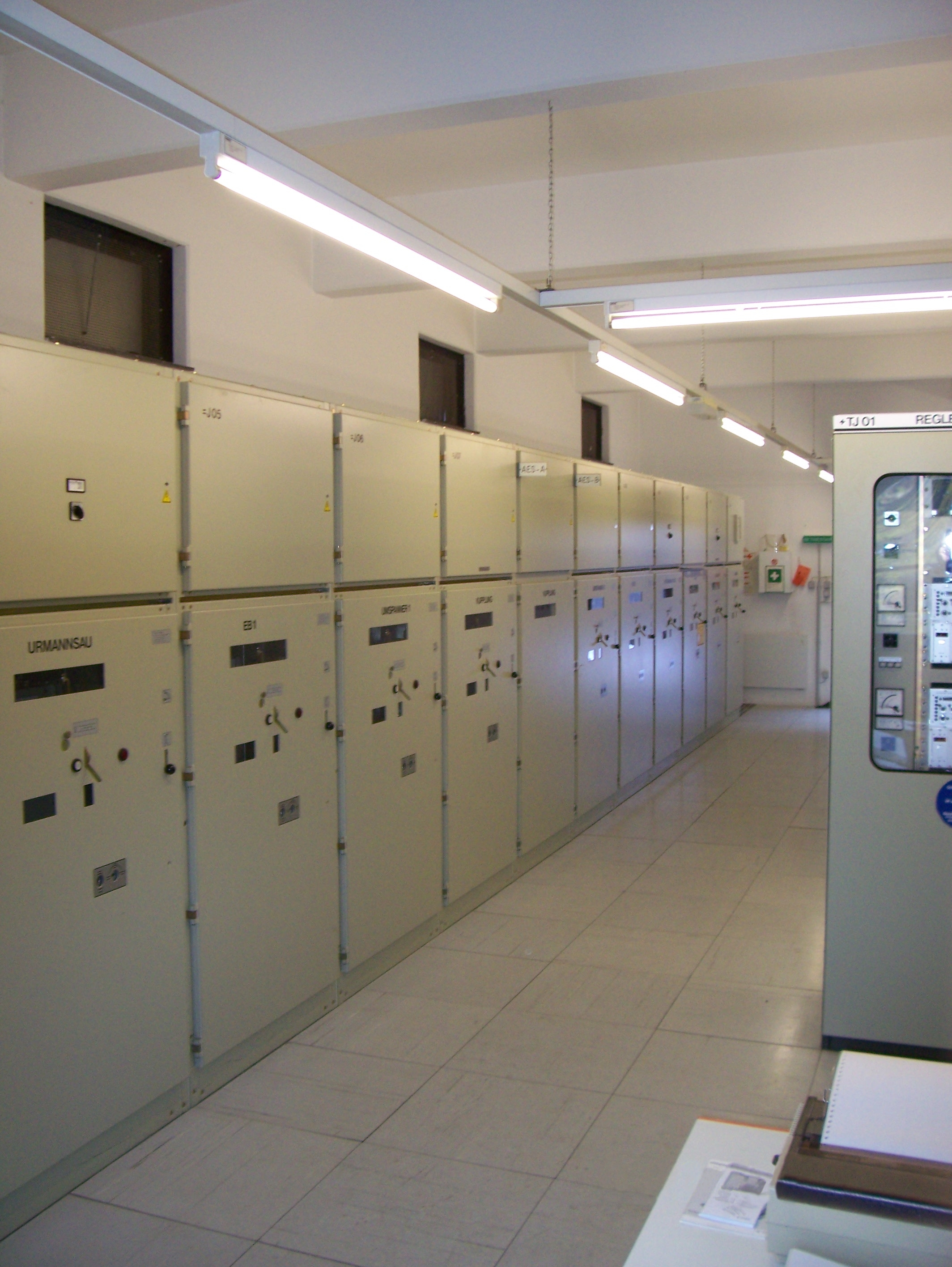 Mittelspannungsverteilung: 20-kV-Schaltanlage eines Innenraum-Umspannwerkes der EVN, Österreich Kamera: Kodak C663 Danksagung: Unter freundlicher Mitwirkung und Unterstützung der: EVN AG, EVN Platz, 2344 Maria Enzersdorf, Hr. E. Jungwirth & Hr. Mag. S. Zach